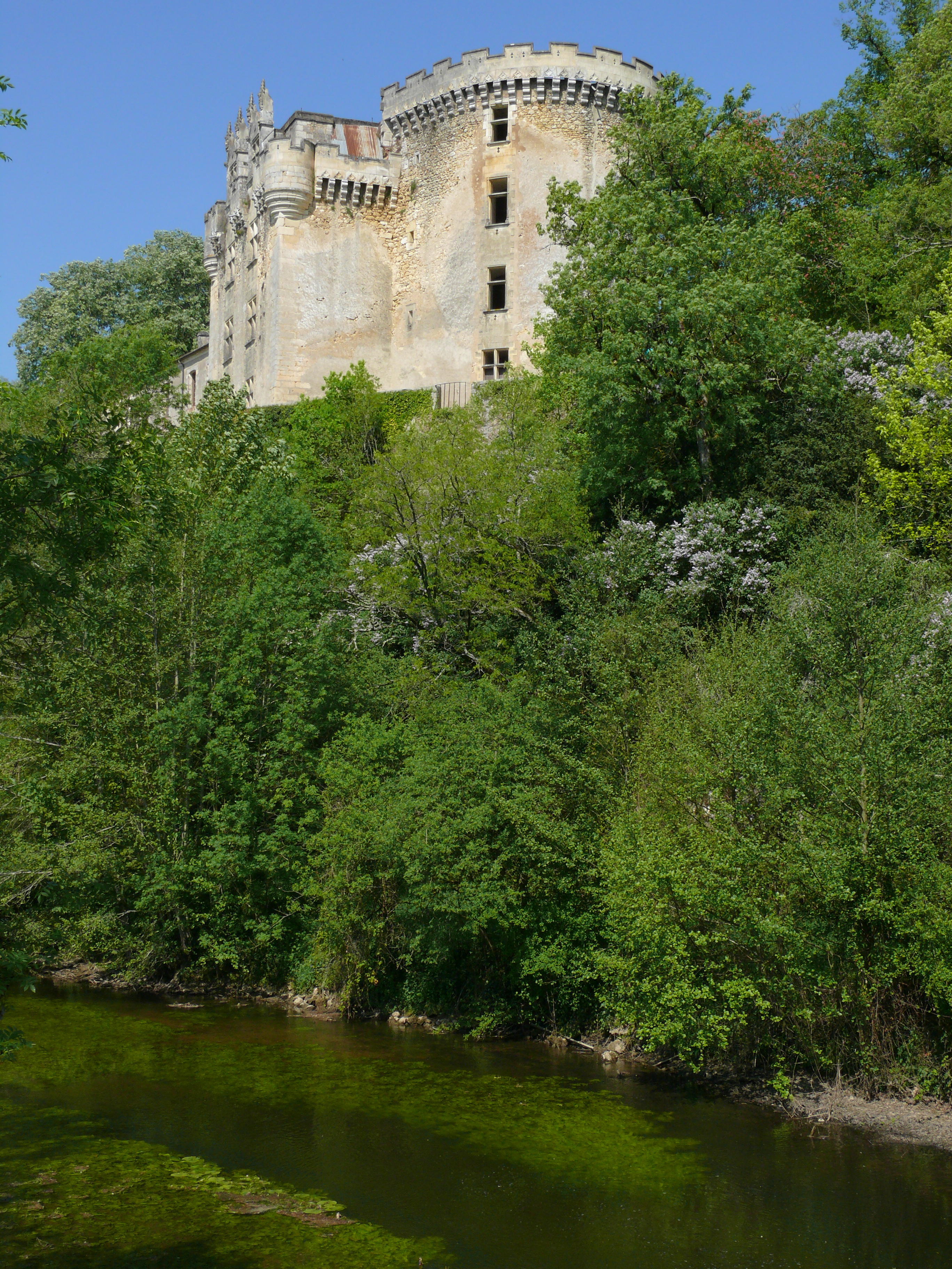 Château de la Chapelle-Faucher - Façade côté Côle